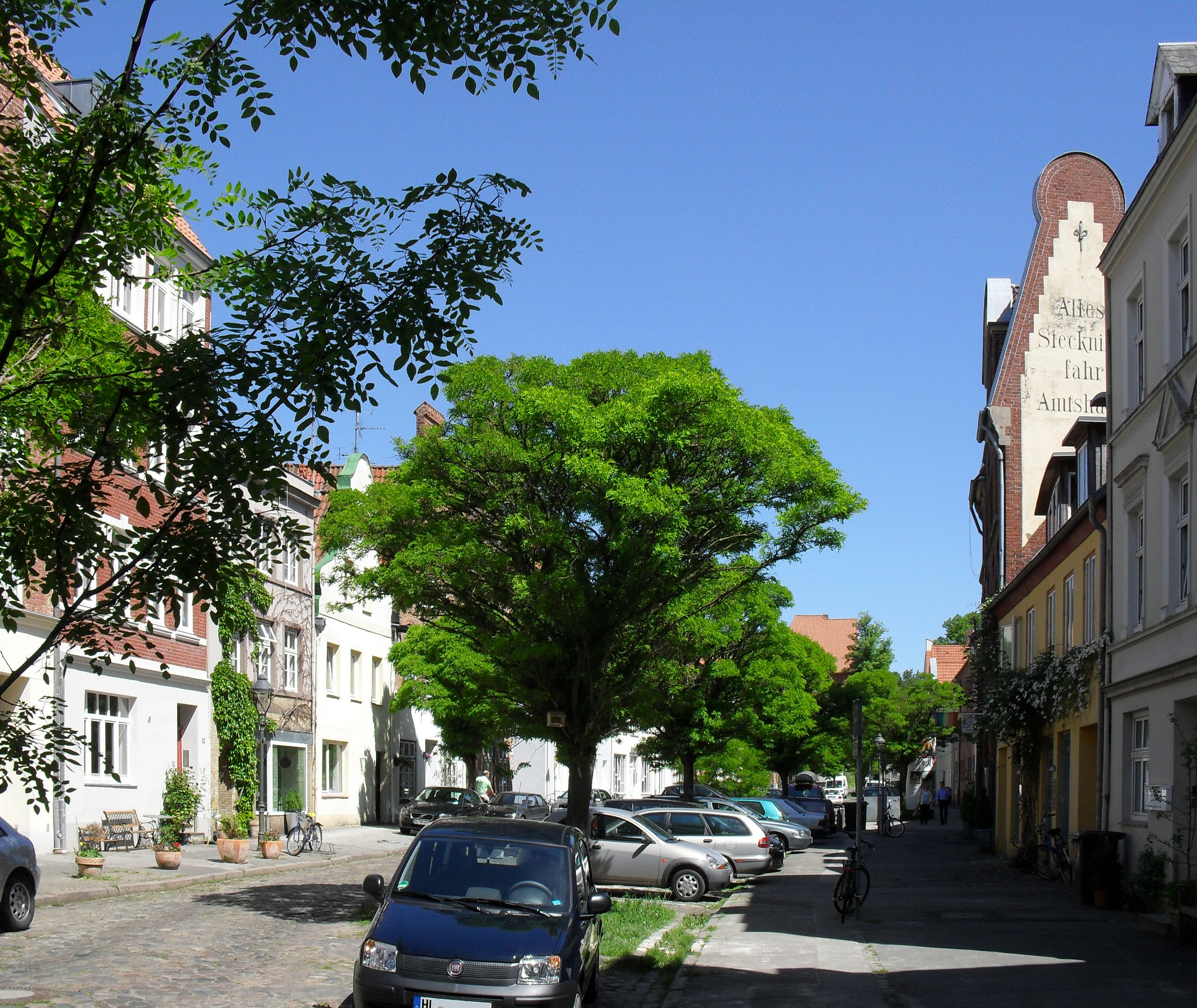 Die Hartengrube in Lübeck